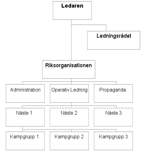 Svenska motståndsrörelsens organisationsstruktur.